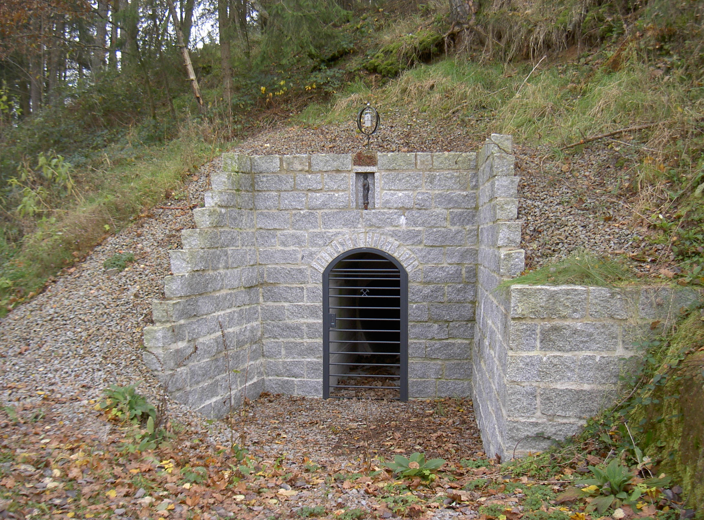 Schwerspat-Stollen bei Furthmühle